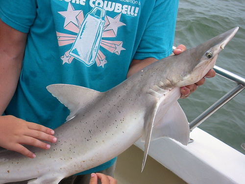 Sphyrna tiburo. Sphyrna tiburo, Bonnethead Shark